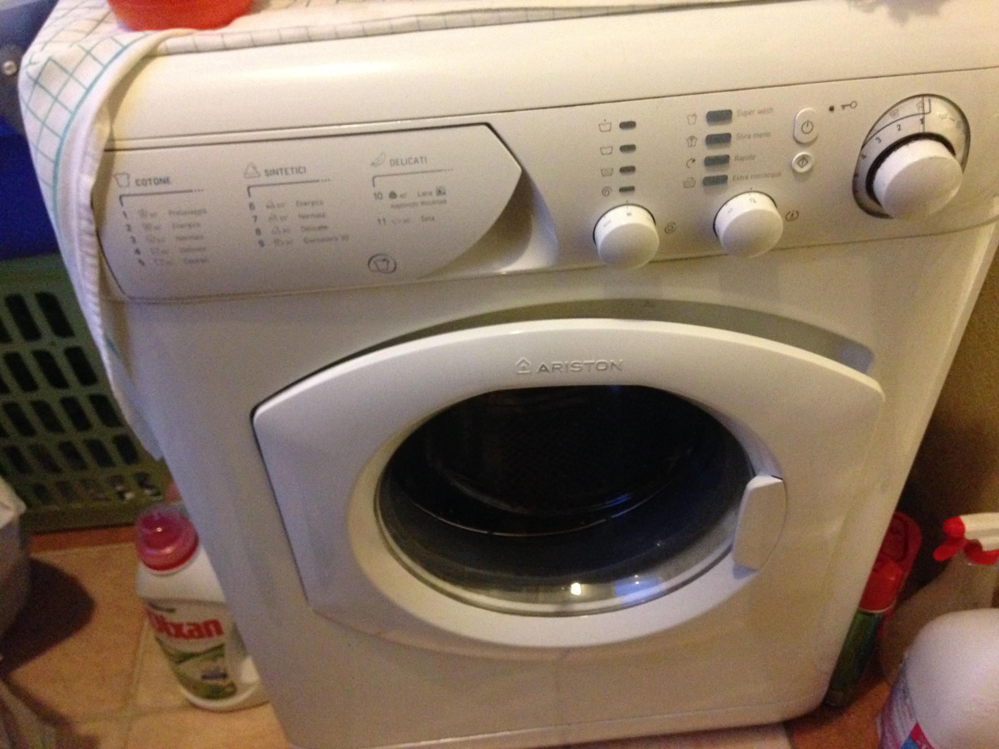 Lavatrice Ariston usata dal 2004 al 2016